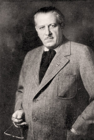 Sindacalista, giornalista, editore, antifascista italiano naturalizzato statunitense.